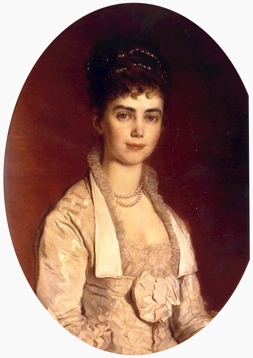 Prinzessin Thyra von Dänemark (1853−1933), Herzogin von Schleswig-Holstein-Sonderburg und Glücksburg